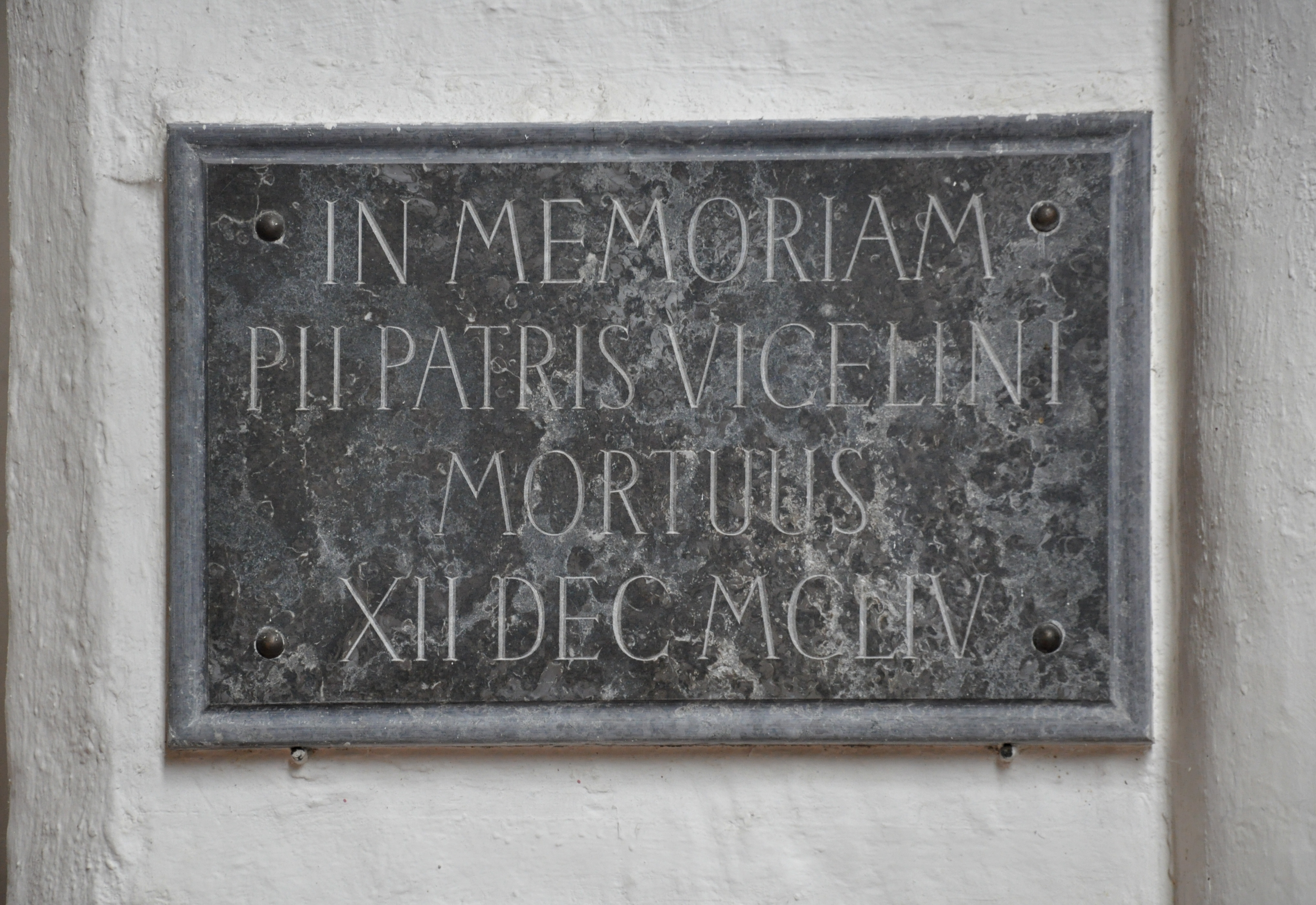 Bordesholm, Klosterkirche, barocke Hinweistafel auf die Grabstätte Vicelins, dessen Gebeine 1332 von Neumünster hierher überführt wurden und der Überlieferung nach vor dem Hochaltar beigesetzt wurden